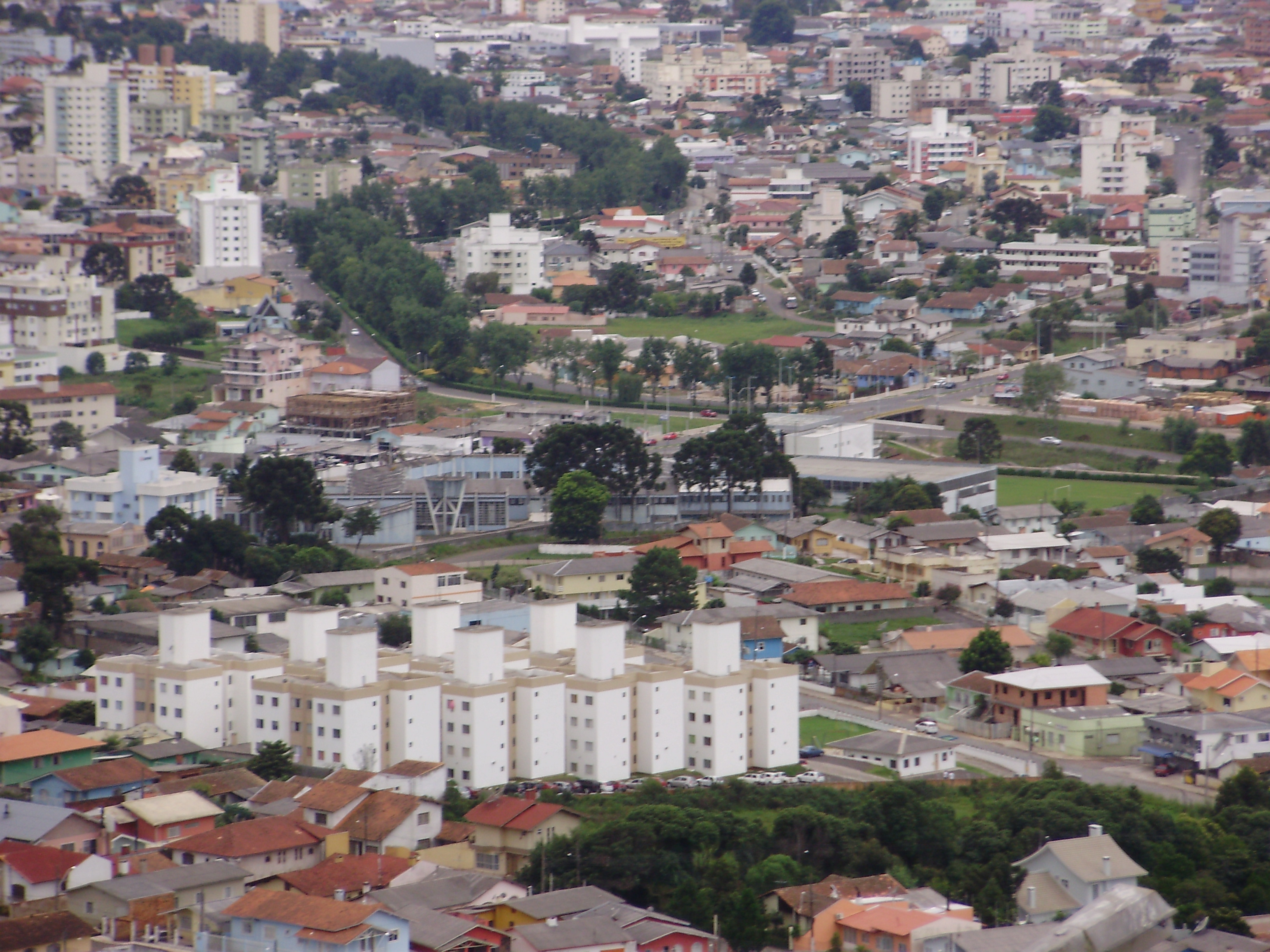 Vista do Morro da Cruz do Colégio Industrial de Lages